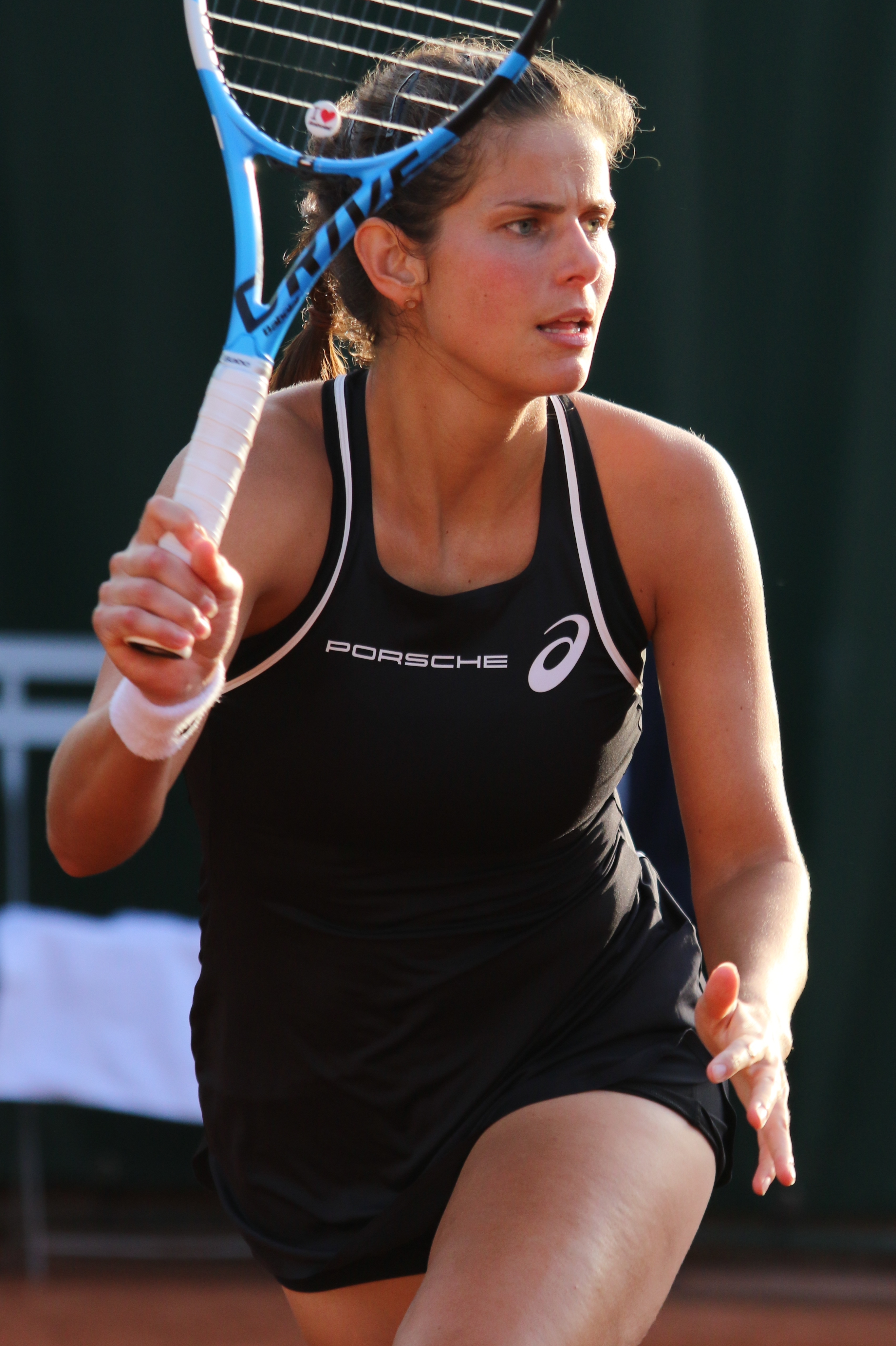 Goerges RG18 (18)